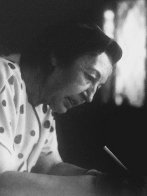 Retrato de Elvira Amado escribiendo.